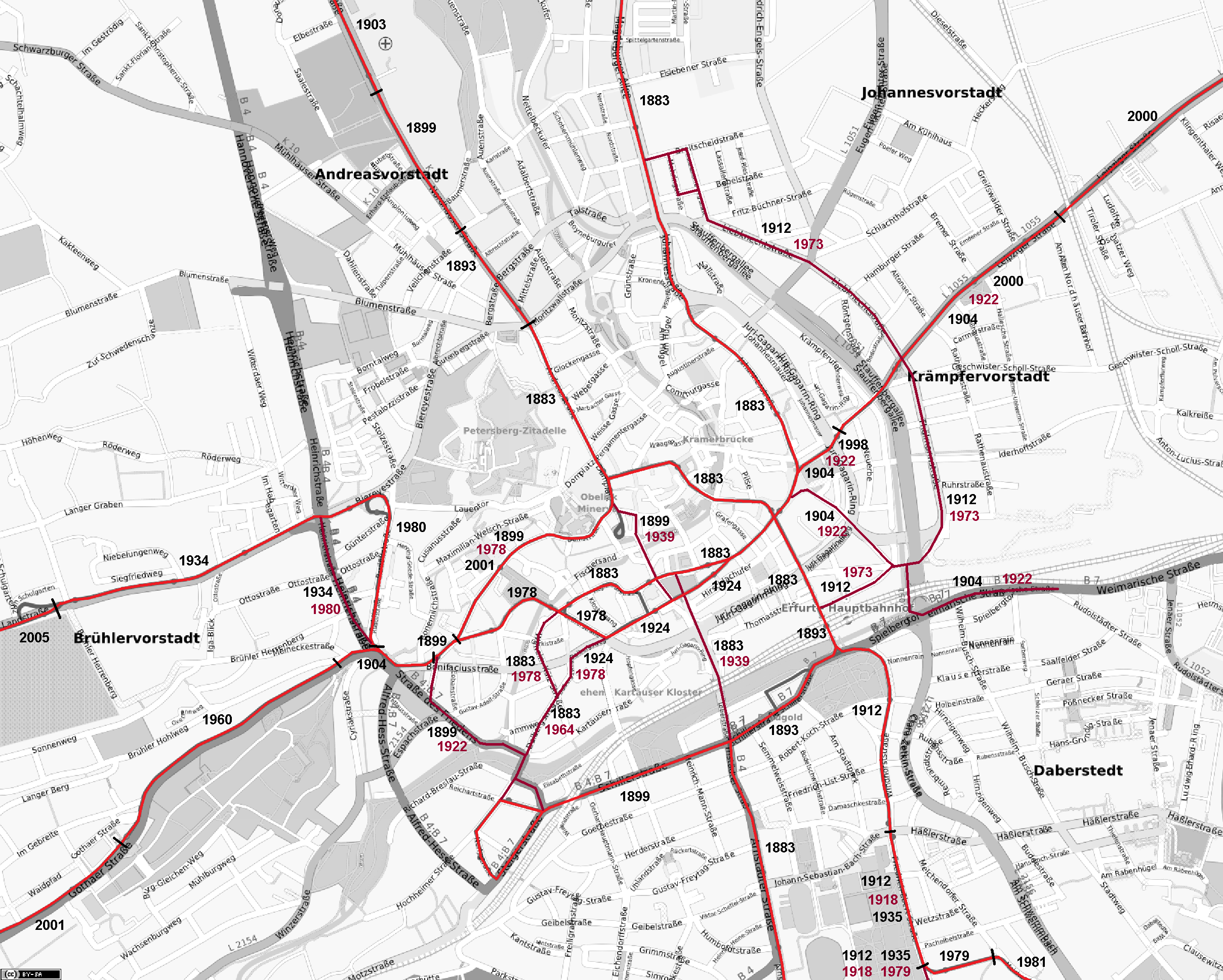 Der Plan zeigt einen Ausschnitt des Erfurter Stadtbahnnetzes mit Eröffnungsdaten (schwarz) und Stilllegungsdaten (rot). Rote Strecken sind in Betrieb, die dunkelroten Strecken sind stillgelegt.